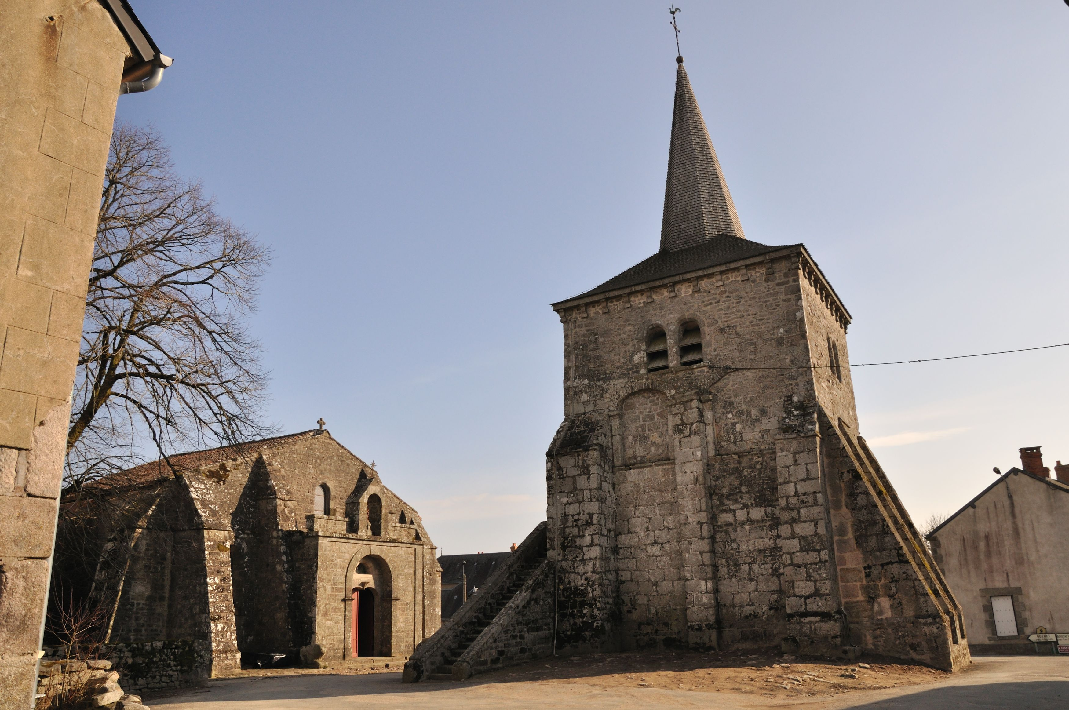 Toulx-Sainte-Croix (Creuse) - Eglise Saint-Martial et clocher